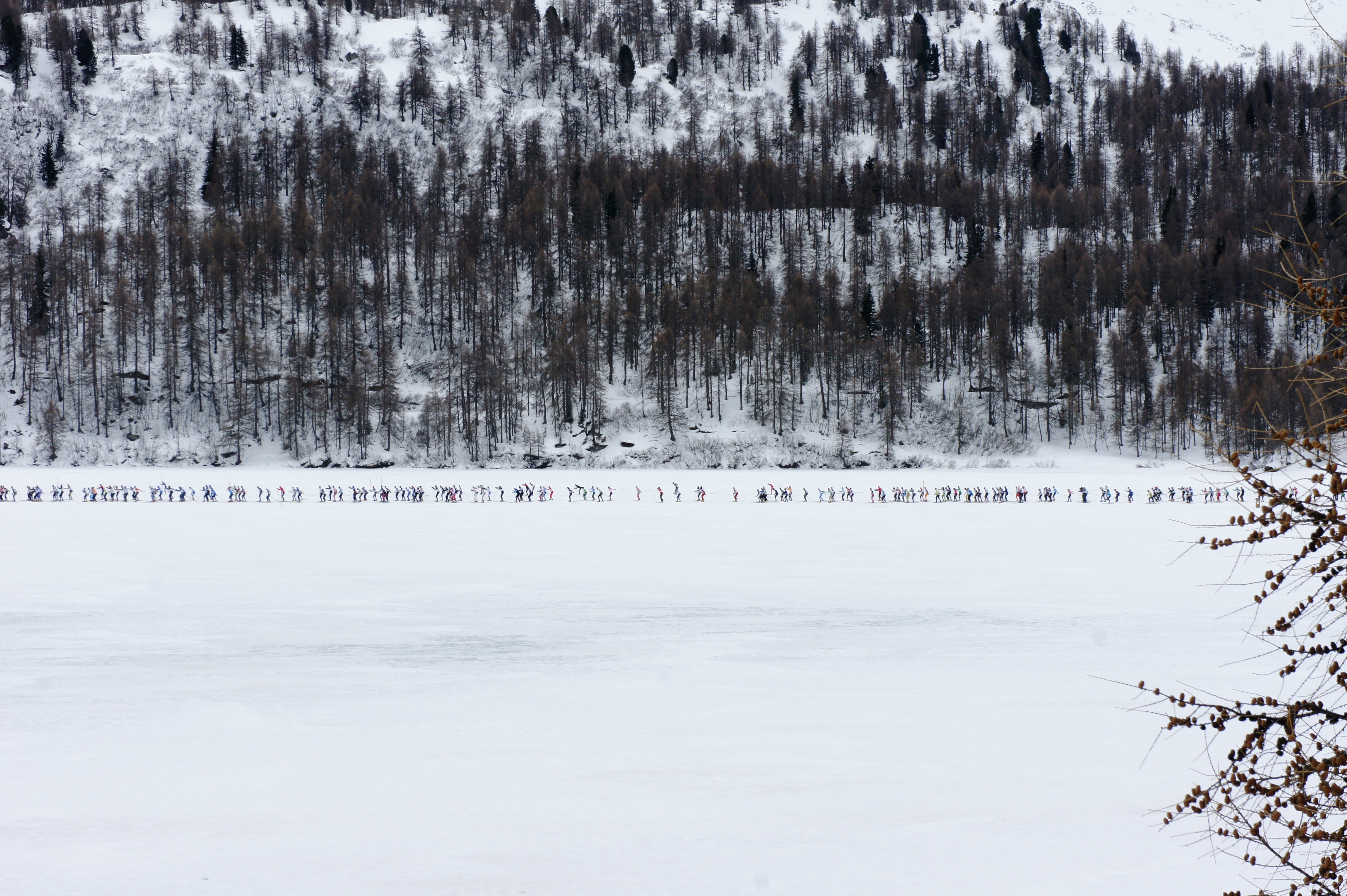 Langläufer unterwegs wenige Minuten nach dem Start des Engadin Skimarathon (Vorlauf der Funktionäre) auf dem Silsersee.